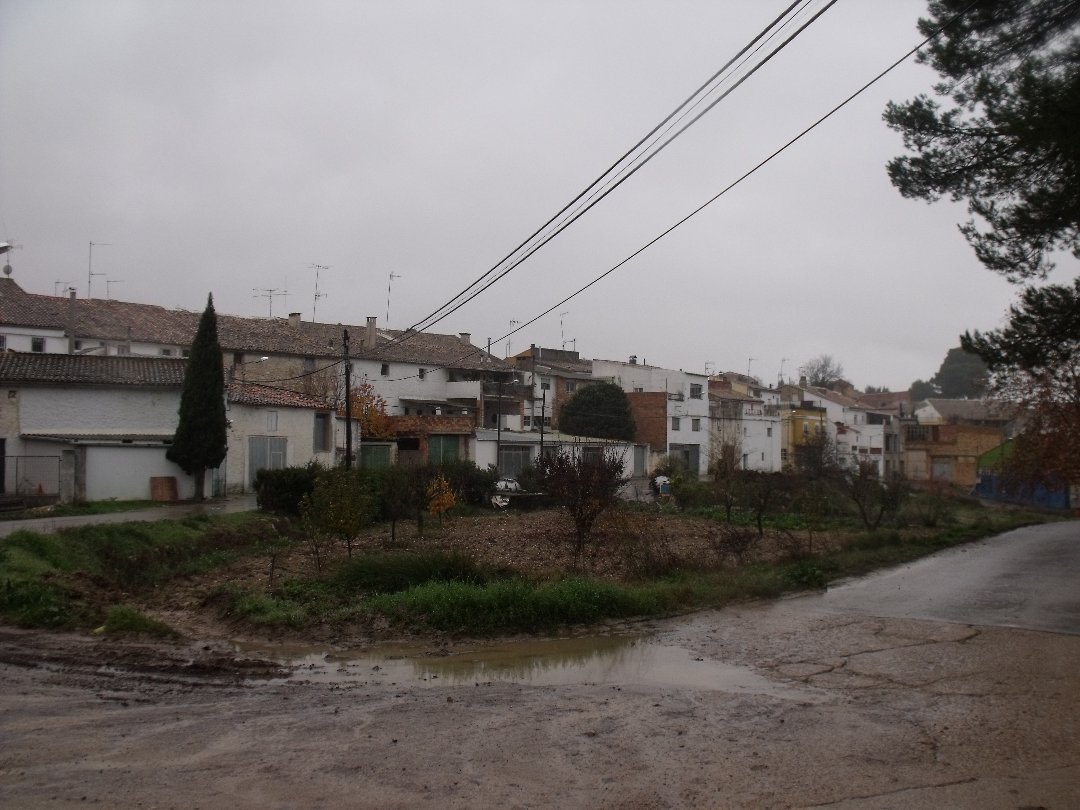 casas de la pedanía